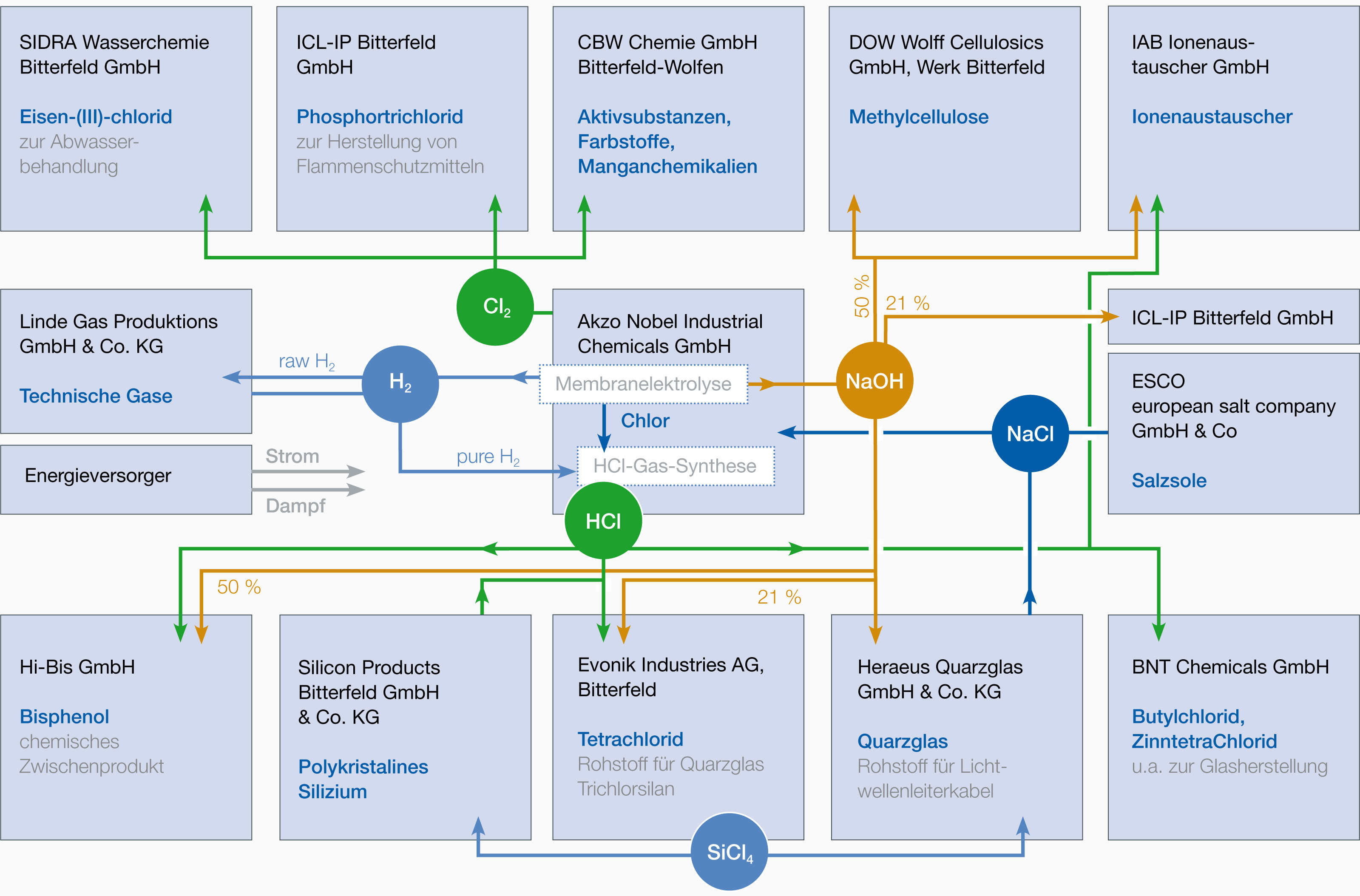 Vernetzung der im Chemiepark ansässigen Unternehmen